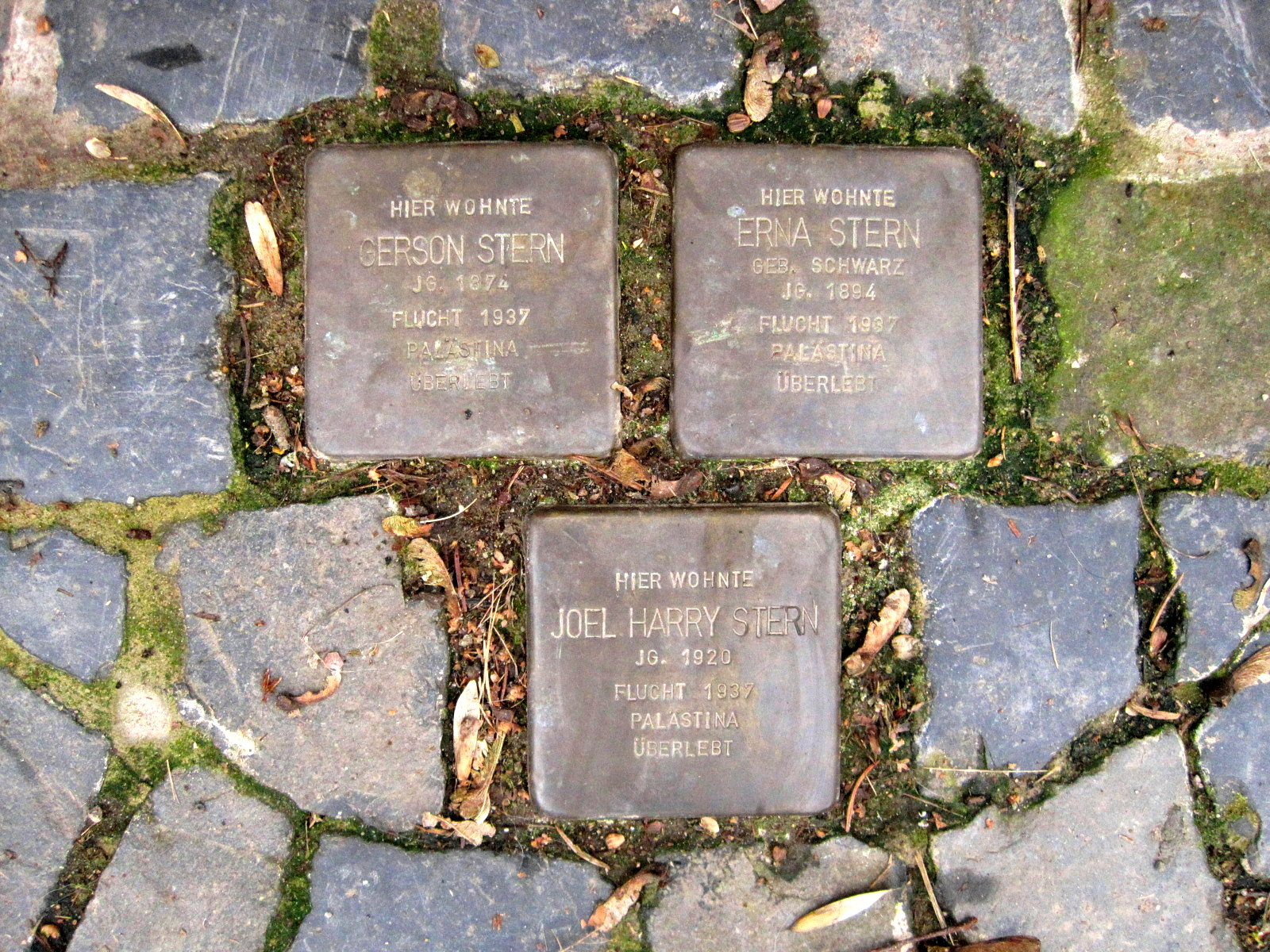 Stolpersteine zum Gedenken an den deutsch-jüdischen Schriftsteller Gerson Stern, seine Frau Erna und den Sohn Joel Harry. Verlegt am 16.03.2010 in Kiedrich, Rheingau, Hessen.Siehe auch Drei Stolpersteine erinnern an die jüdische Familie Stern Seite des Förderkreises Kiedricher Geschichts- und Kulturzeugen e.V. im Internet Archive vom 6. März 2017.